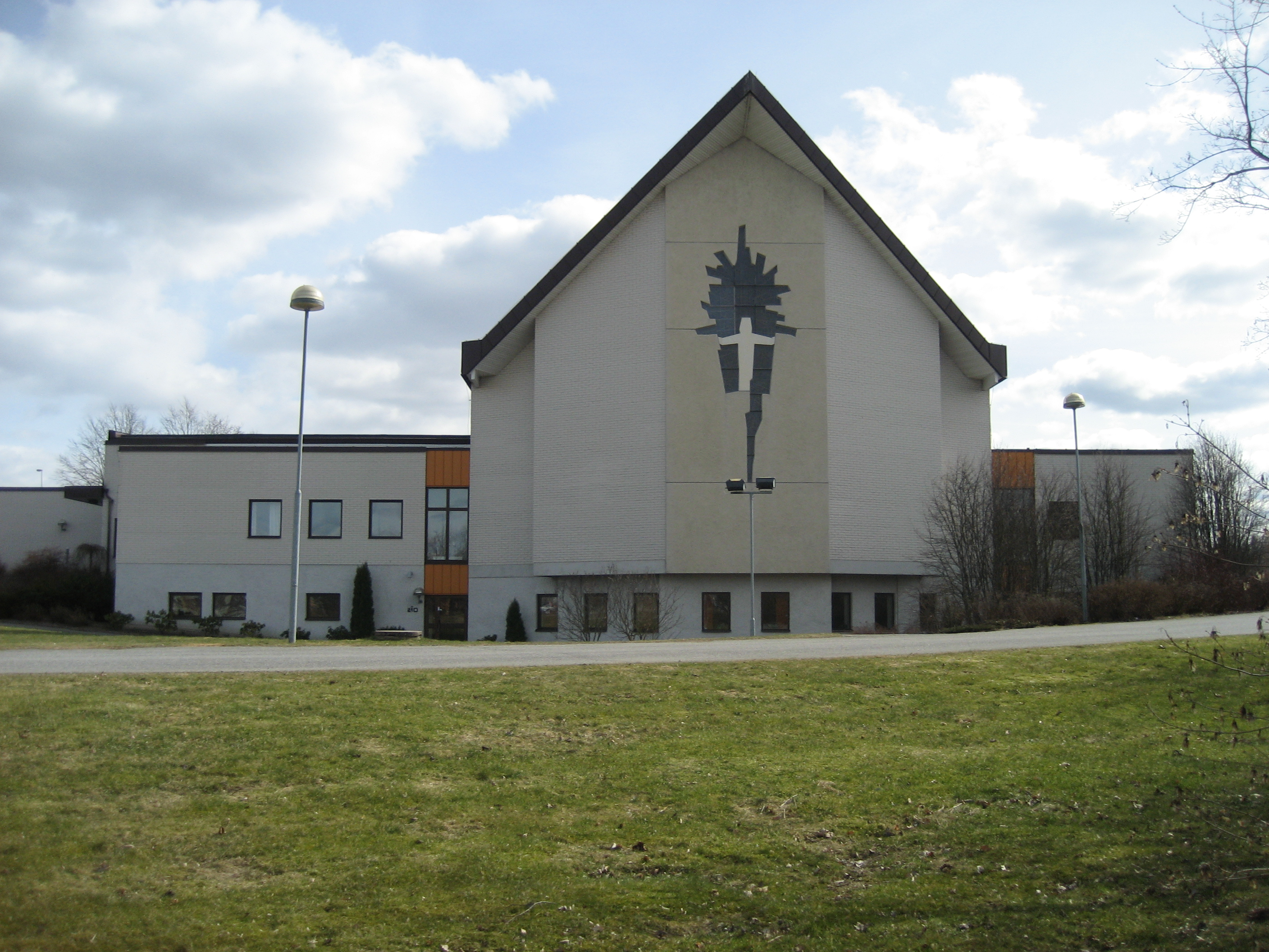 Brickebergskyrkan, Örebro, Sweden